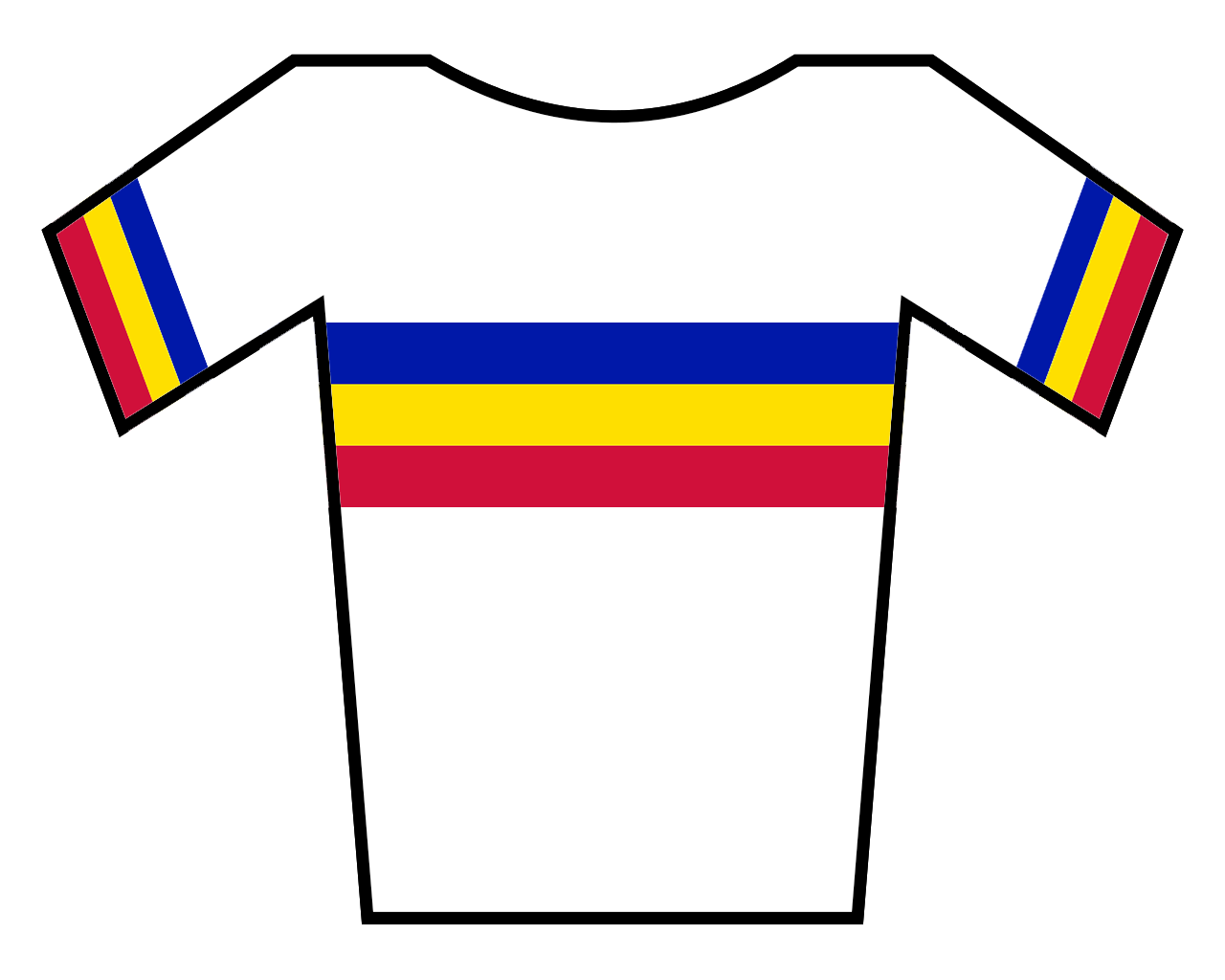 Nationale wielertrui van Andorra